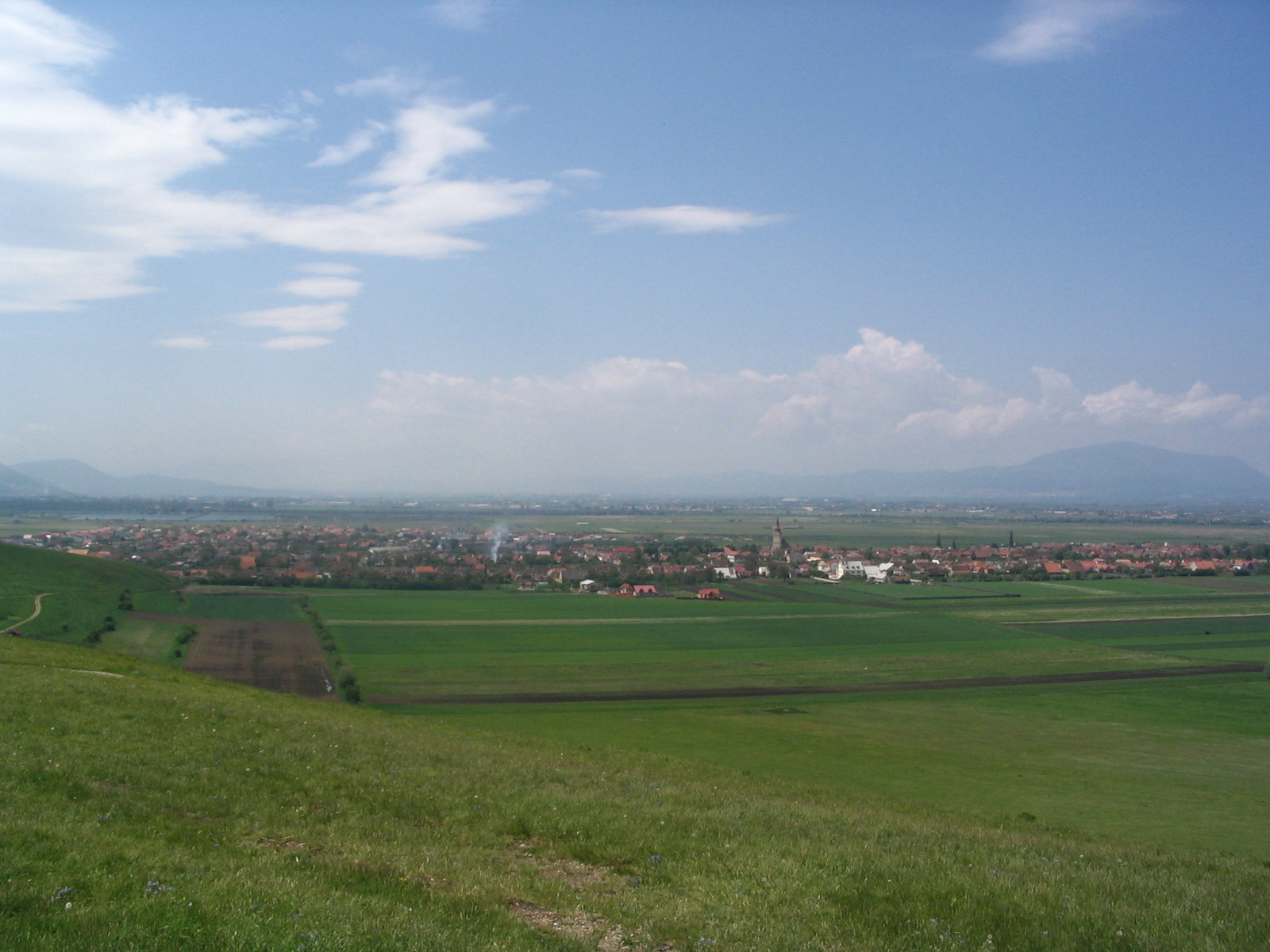 Barcaszentpéter - Sanpetru